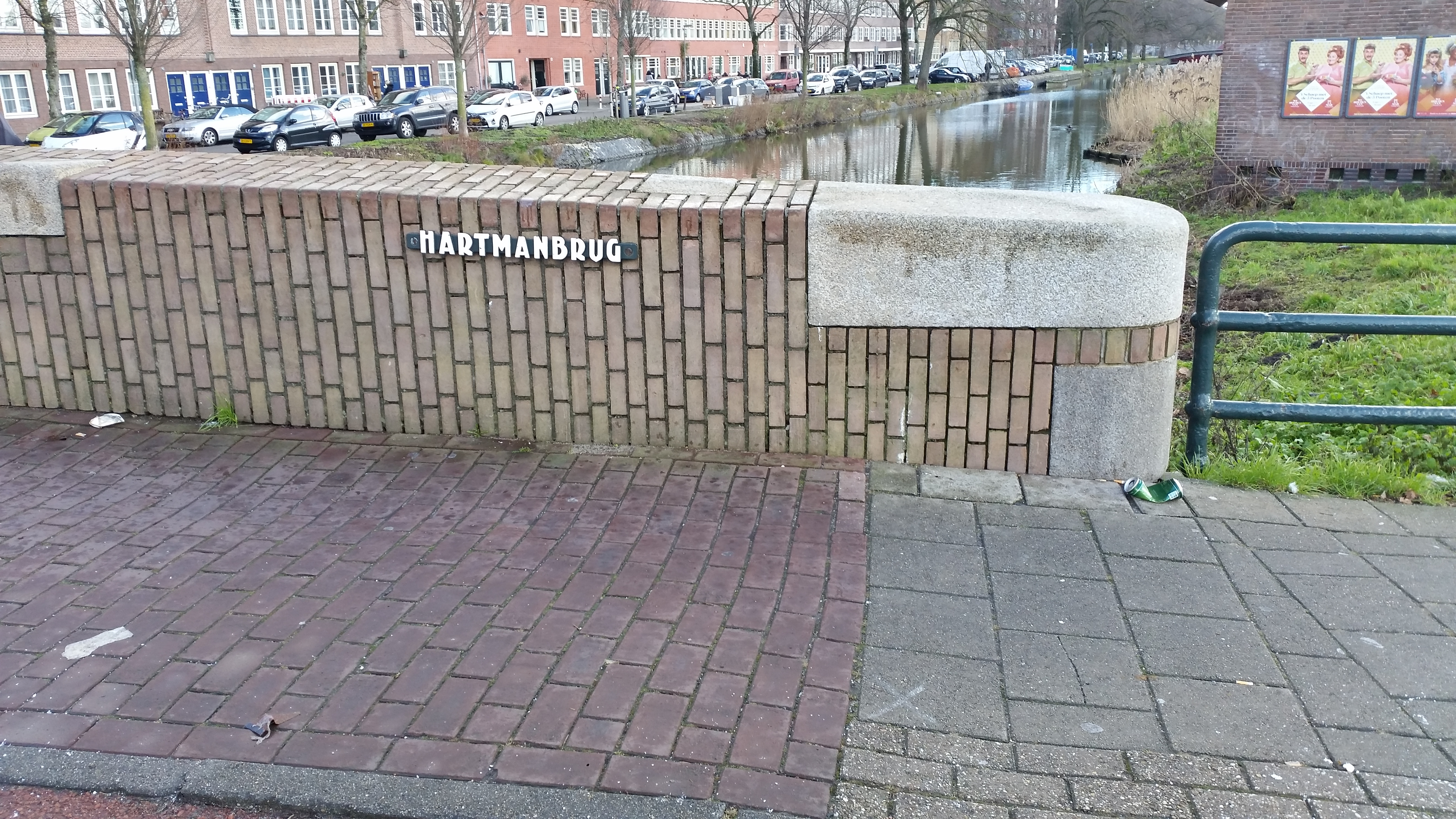 Naamplaat op borstwering van Brug 190, Hartmanbrug